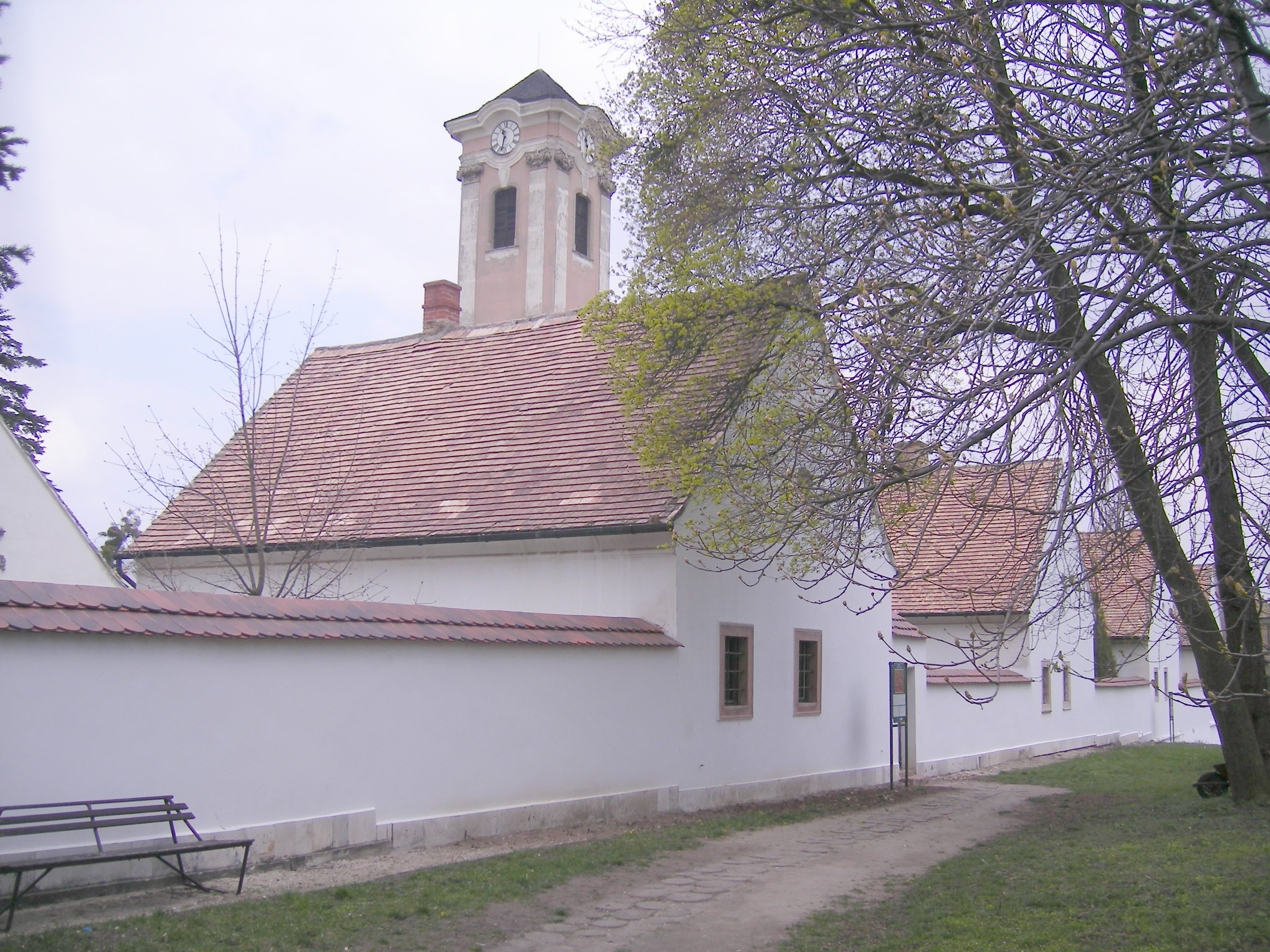 Oroszlány - majkpusztai kamalduli apátság